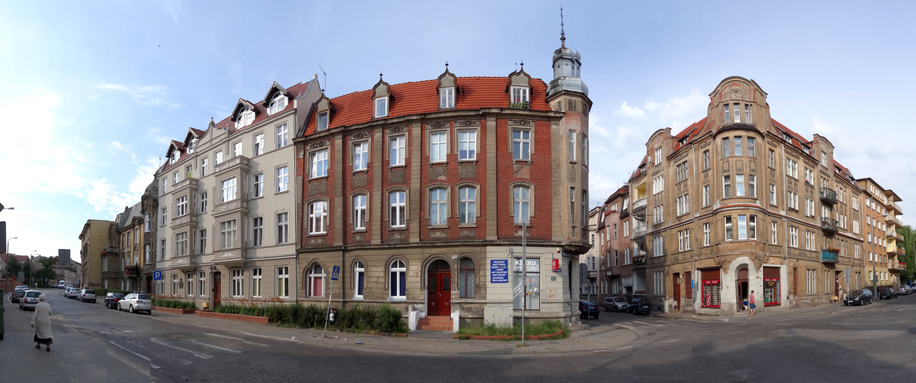 Ulica Świętej Trójcy w Bydgoszczy